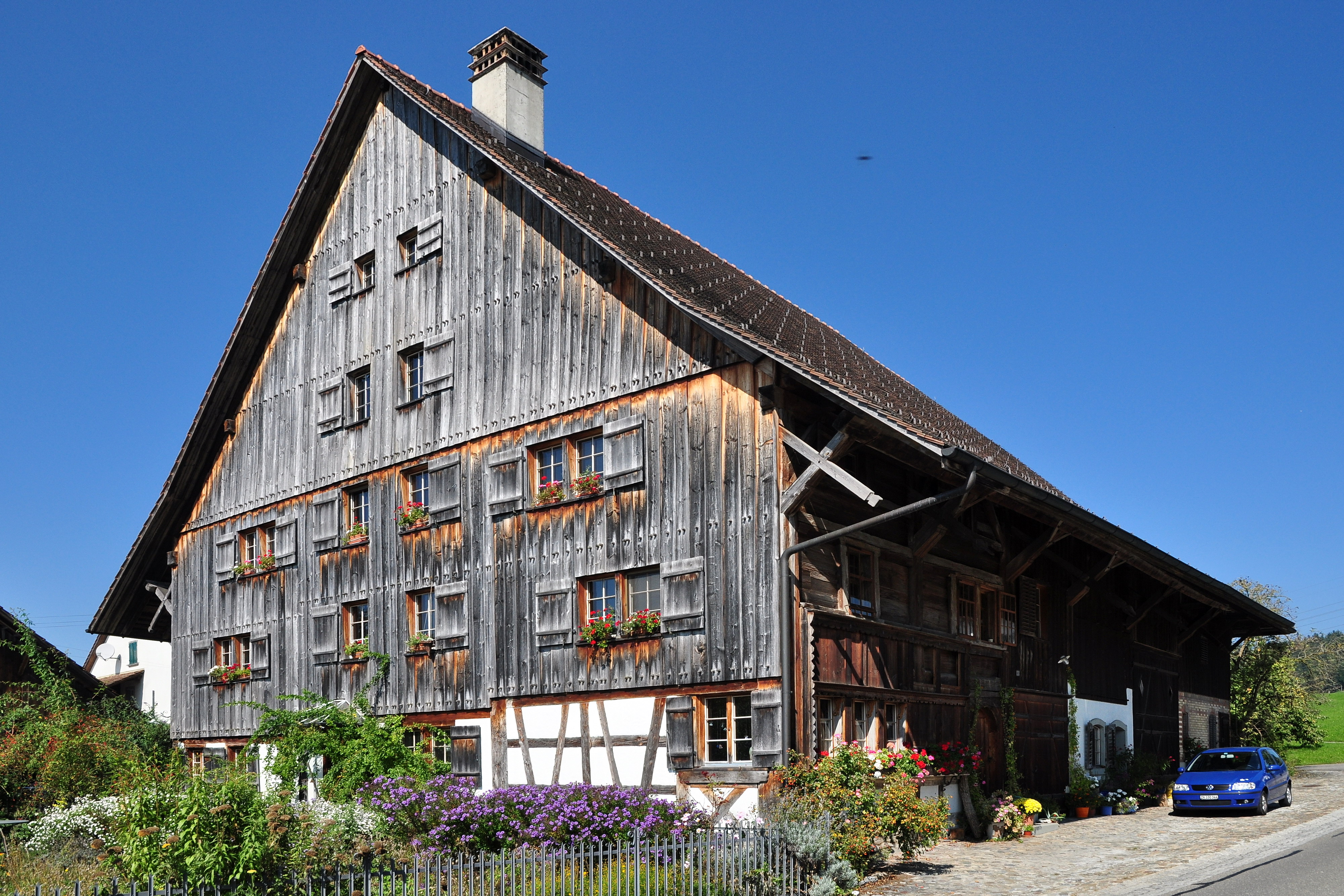 Ehemaliges Bauernhaus, sogenanntes Hablützelhaus, Horbenerstrasse 9 in Illnau-Effretikon (Switzerland)